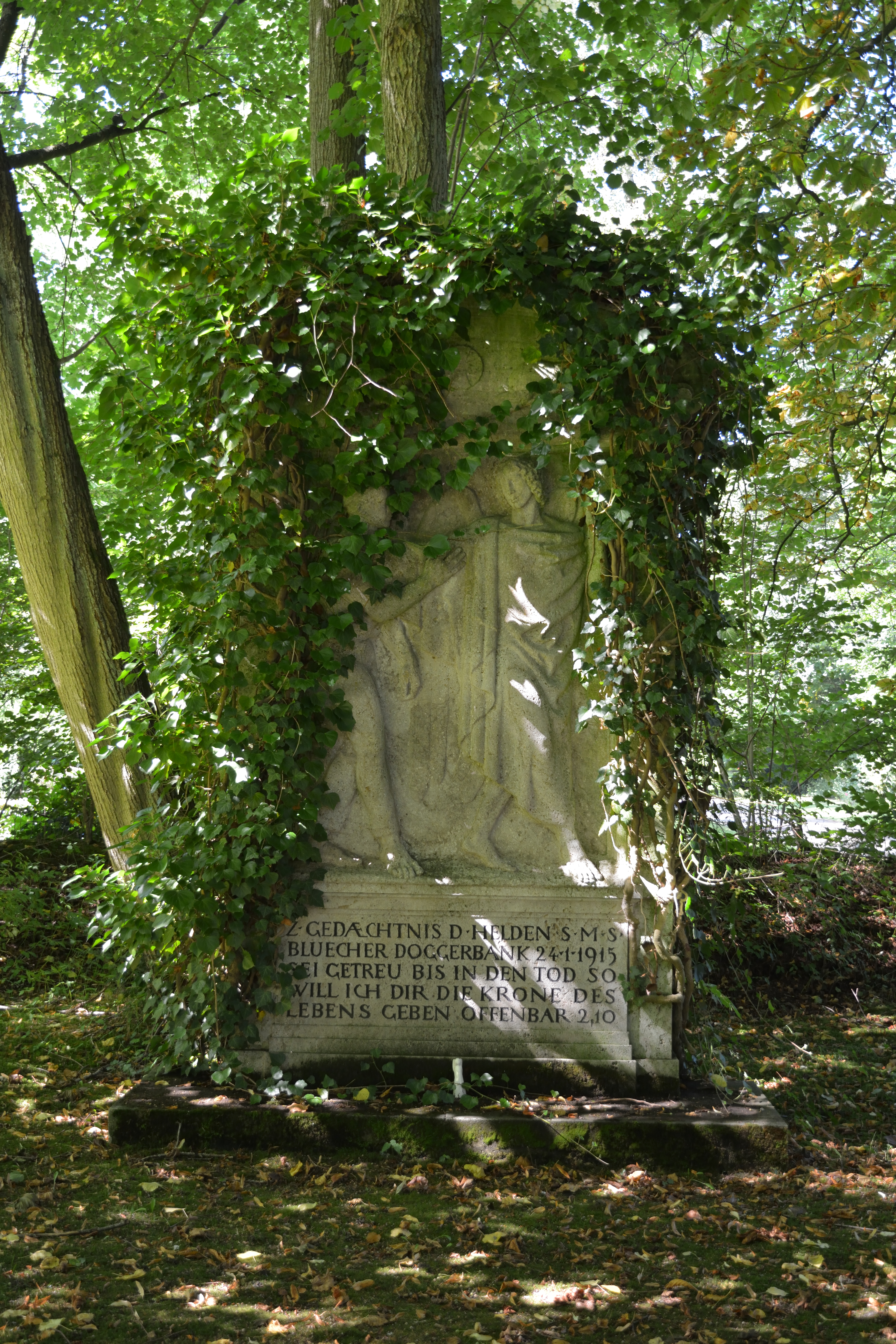 Impressionen aus dem Nordfriedhof in Kiel Ein Grossteil diese Friedhofes ist den Gefallenen der beiden Weltkrige gewidmet.